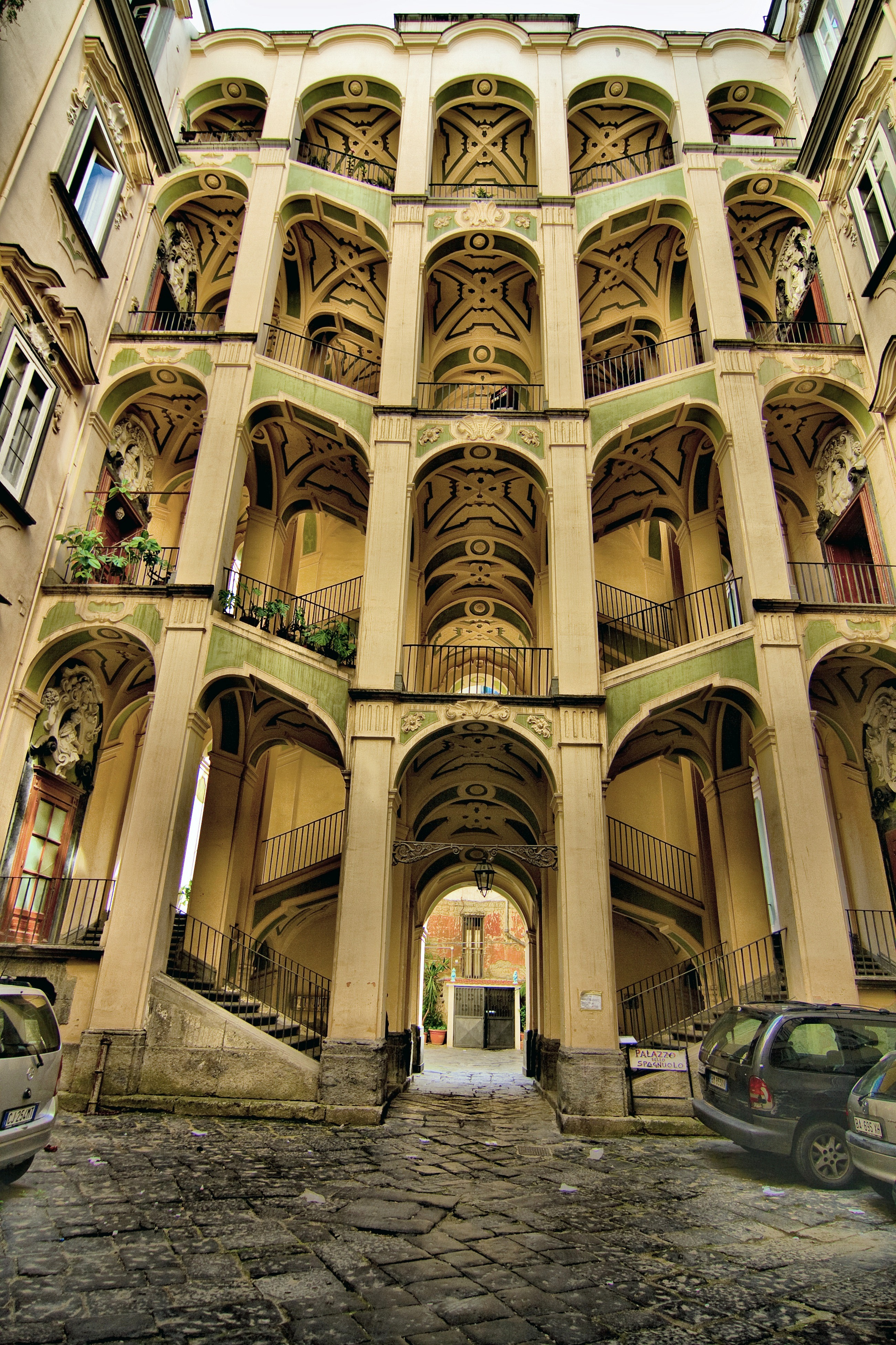 Il Palazzo dello Spagnolo, un palazzo monumentale di Napoli, ubicato in via Vergini nel rione Sanità, in pieno centro storico cittadino.